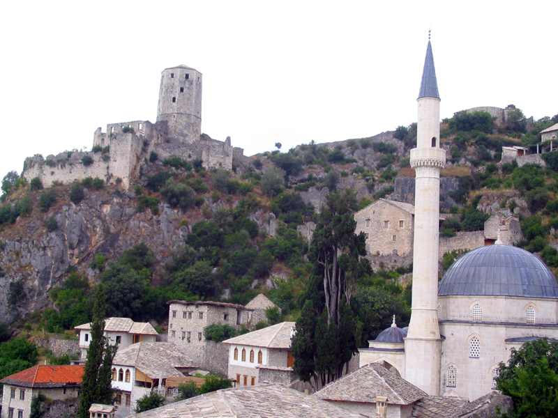 Pohled na od silnice směrem nahoru k Šišman Ibrahim-pašinově mešitě a pevnosti